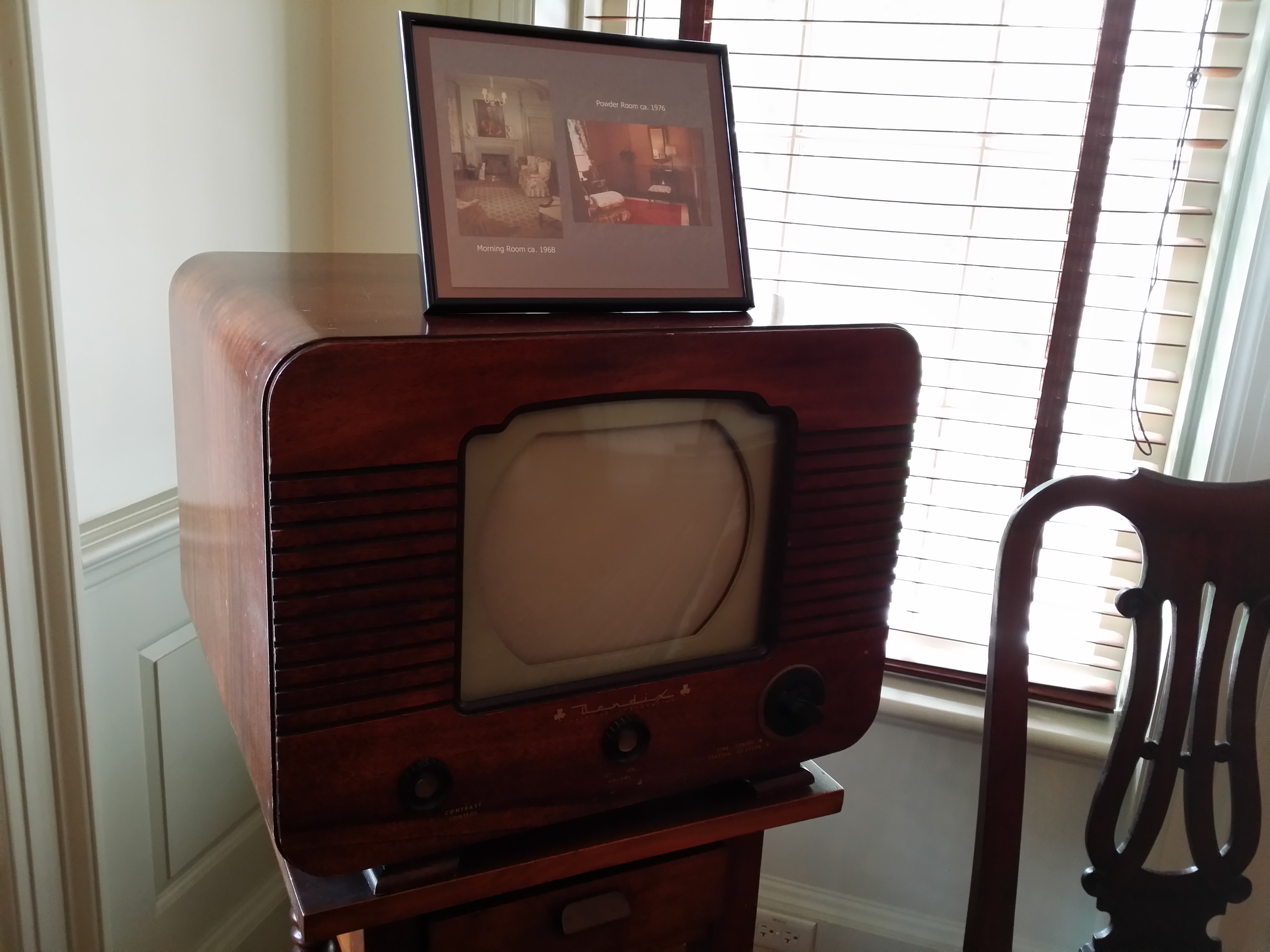 Wildwood, Toledo, OH 43615, USA